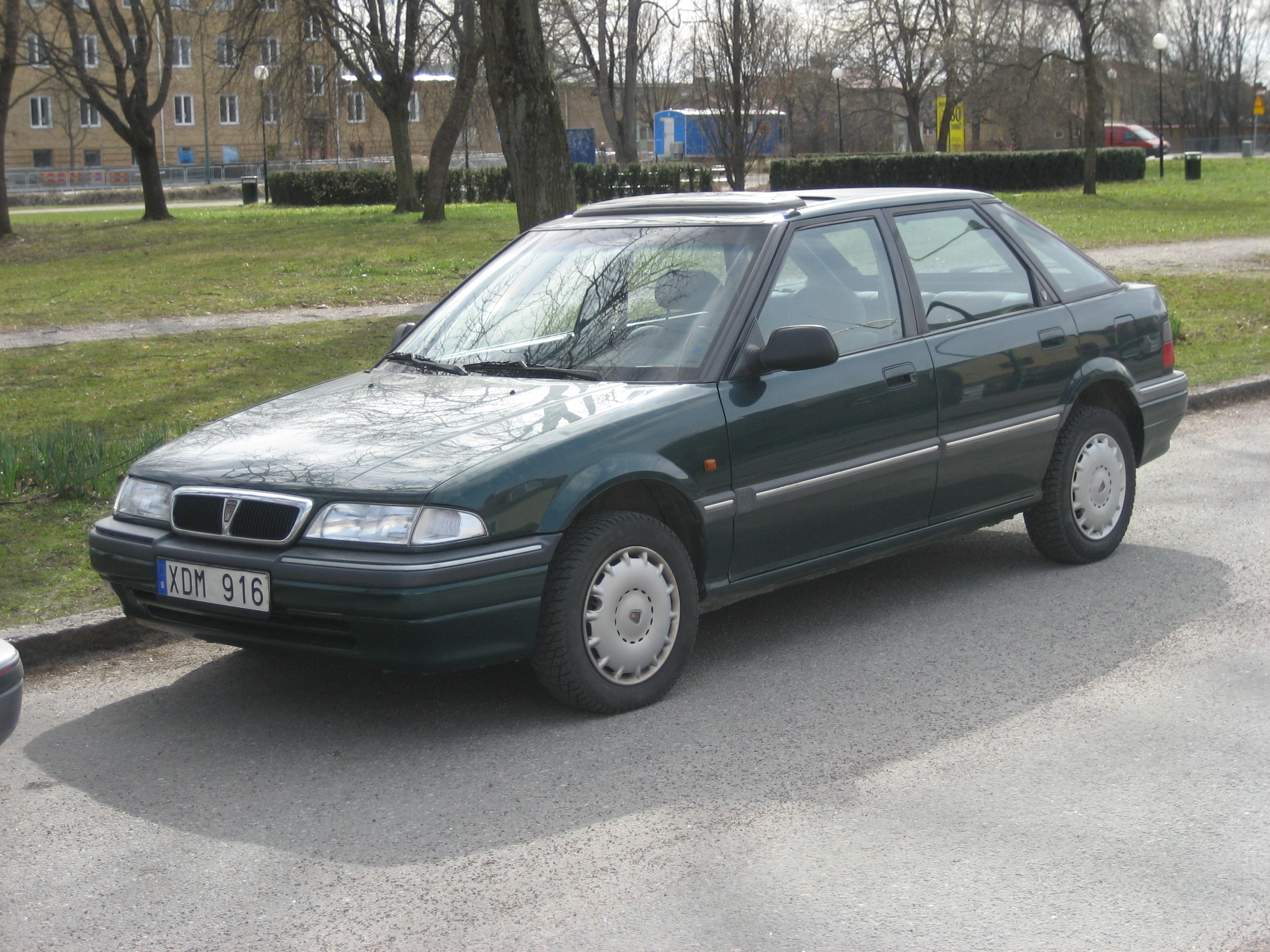 1995 Rover 214, Örebro, Sweden